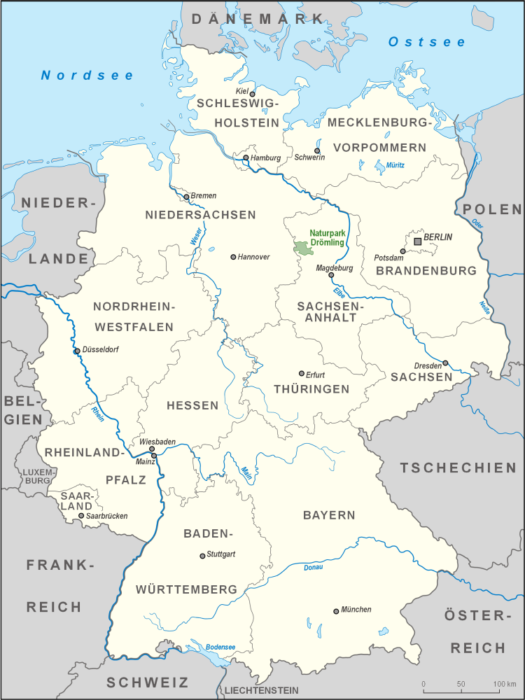 Karte des Naturparks Drömling in Deutschland